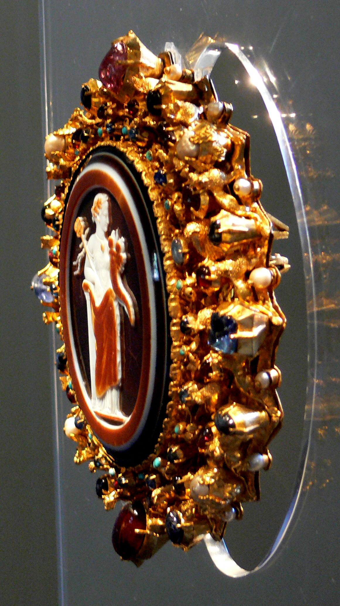 Schaffhausen, Museum zu Allerheiligen, Schatzkammer „Onyx von Schaffhausen“, römische Gemme unbekannter Herkunft (gedeutet als Personifikation des Friedens in Gestalt der Livia Drusilla, Gattin des Augustus), in Gold gefasst im 13. Jahrhundert n. Chr. (oberrheinische Arbeit), Inv. Nr. 16375